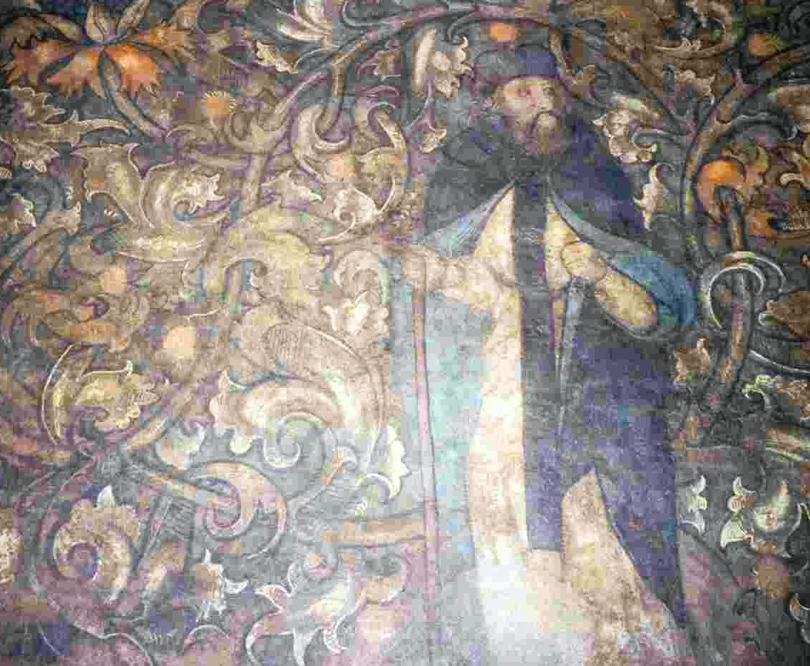 Wandmalerei an der Ostwand des Refektoriums des Klosters Lüne (um 1500).